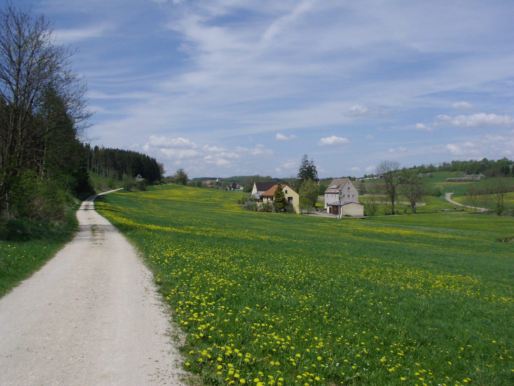 Steinmühle an der Anlauter, Ortsteil von Nennslingen im mittelfränkischen Landkreis Weißenburg-Gunzenhausen